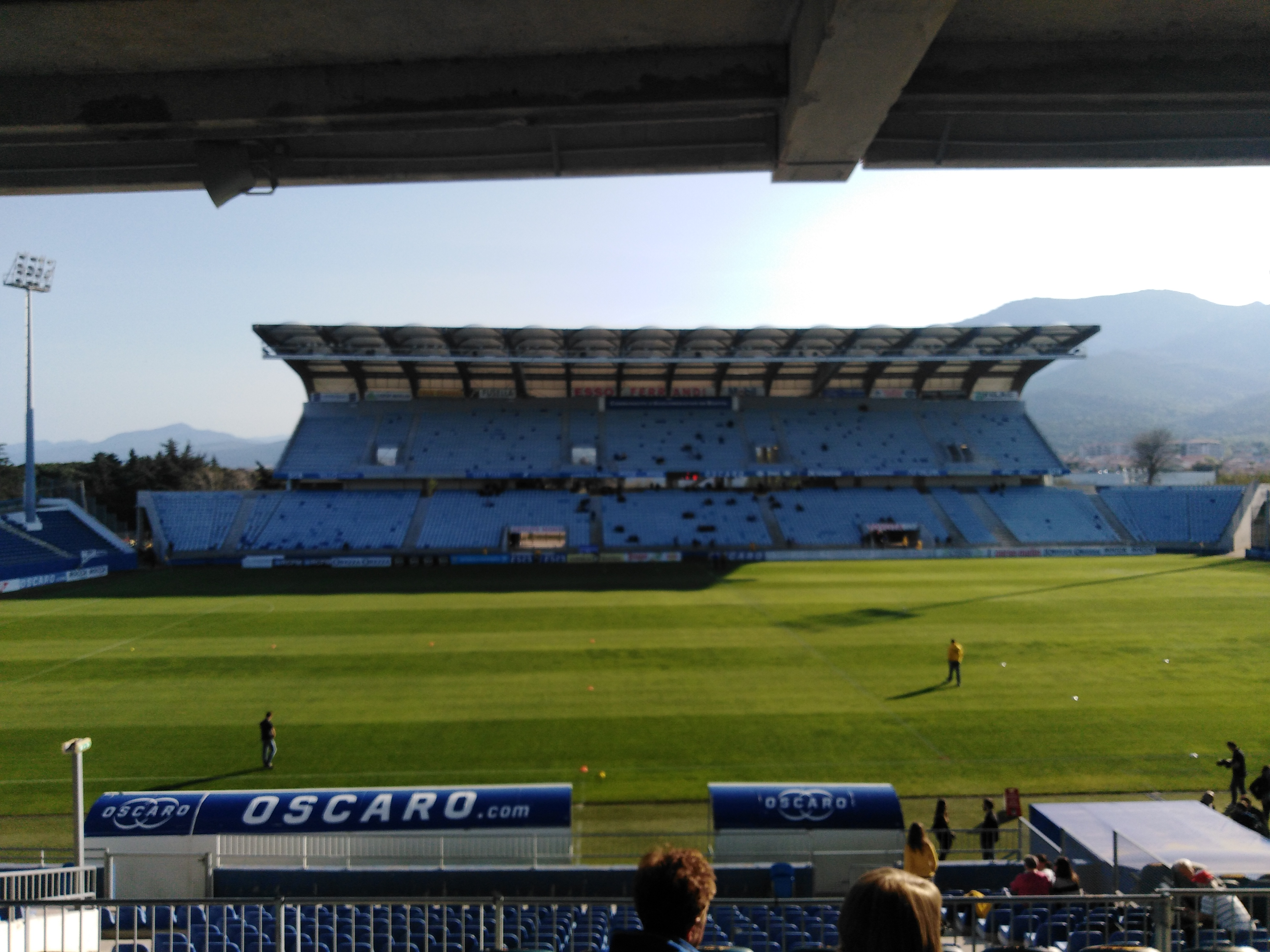 Vue sur la tribune sud du stade Armand Cesari lors du match S.C.Bastia-Gemenos du19 Avril 2019, comptant pour la 22ème journée du championnat de National 3 de la poule Mediterranée. Photo prise depuis la tribune nord Claude Papi 50 minutes avant la rencontre.